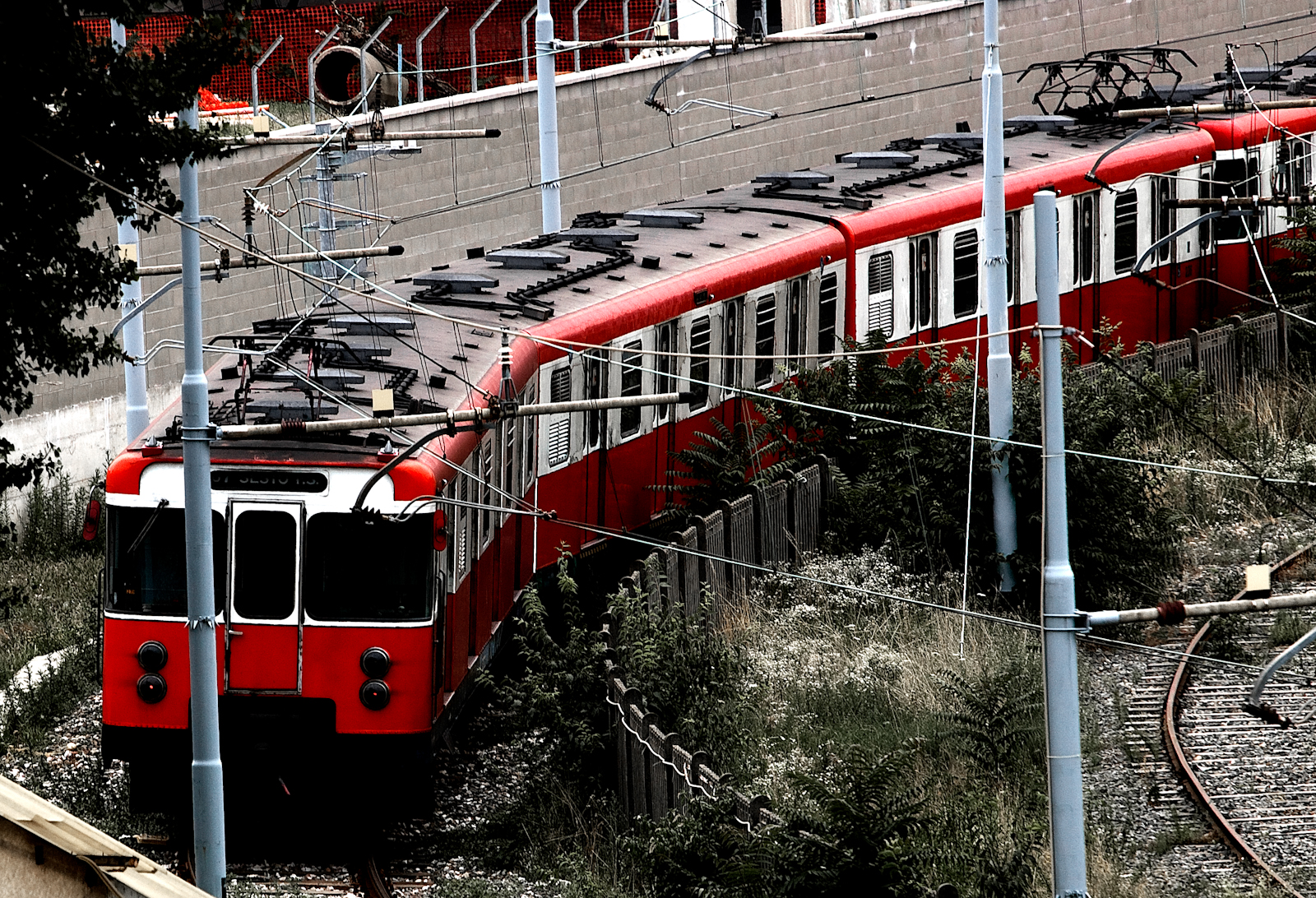 Treno della linea M1 della metropolitana di Milano in sosta al deposito di Precotto